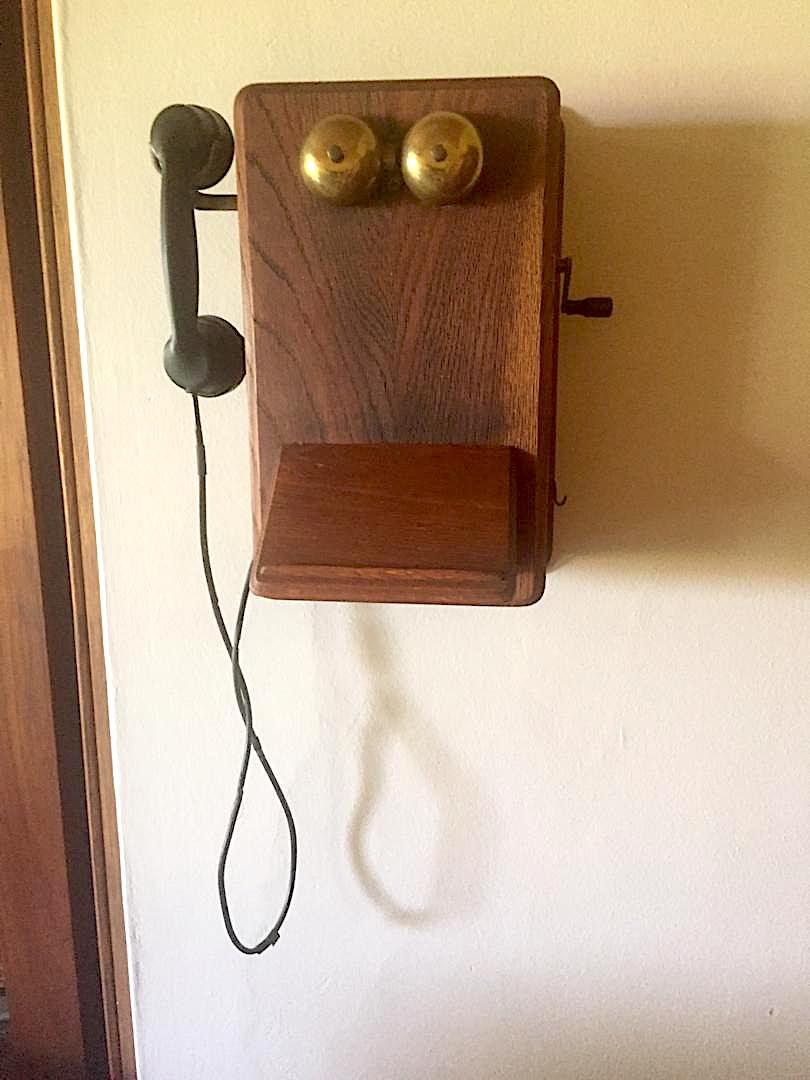 Farmtelefon auf Farm Langverwacht (2019)